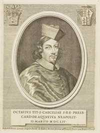 Cardinal Ottavio Acquaviva d'Aragona (1608-1674), cardinale 1654